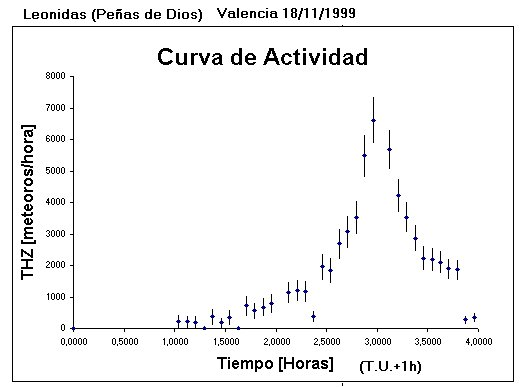 Gráfico de la actividad de las leónidas el 18 de noviembre de 1999 en Peñas de Dios en Valencia (España) basándose en datos personales. La gráfica importante debe recoger el promedio de muchos observadores. El IMO apunta que parece divisarse un máximo doble con un primer pico a 01:53TU y el máximo principal a las 02:01TU. Entre medias se reduce la actividad sensiblemente. Sin embargo, el punto más alto, el cual indica una THZ máxima de 5.400 tiene un error muy grande.